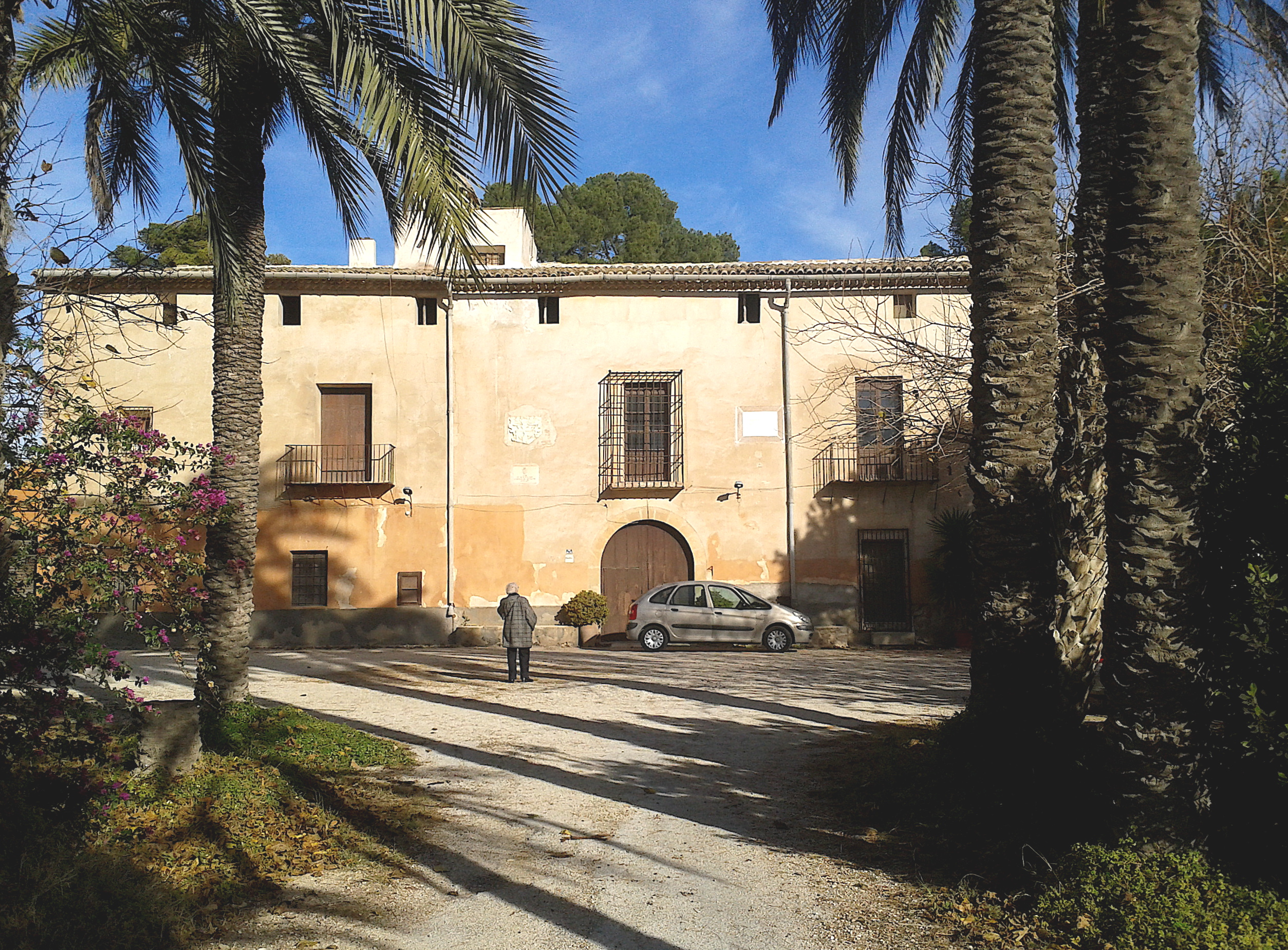 Casa natal de Jorge Juan y Santacilia en El Fondonet (Novelda, España). Imagen tomada en 2013, III Centenario del nacimiento del científico.